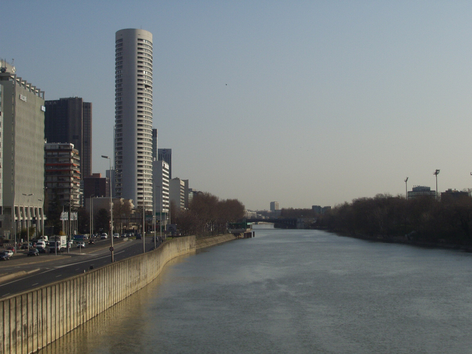 La Tour France se trouve sur les bords de Seine à Puteaux. Auteur : Olivier Passalacqua